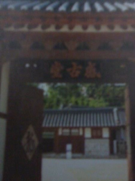 감고당, 명성황후 생가